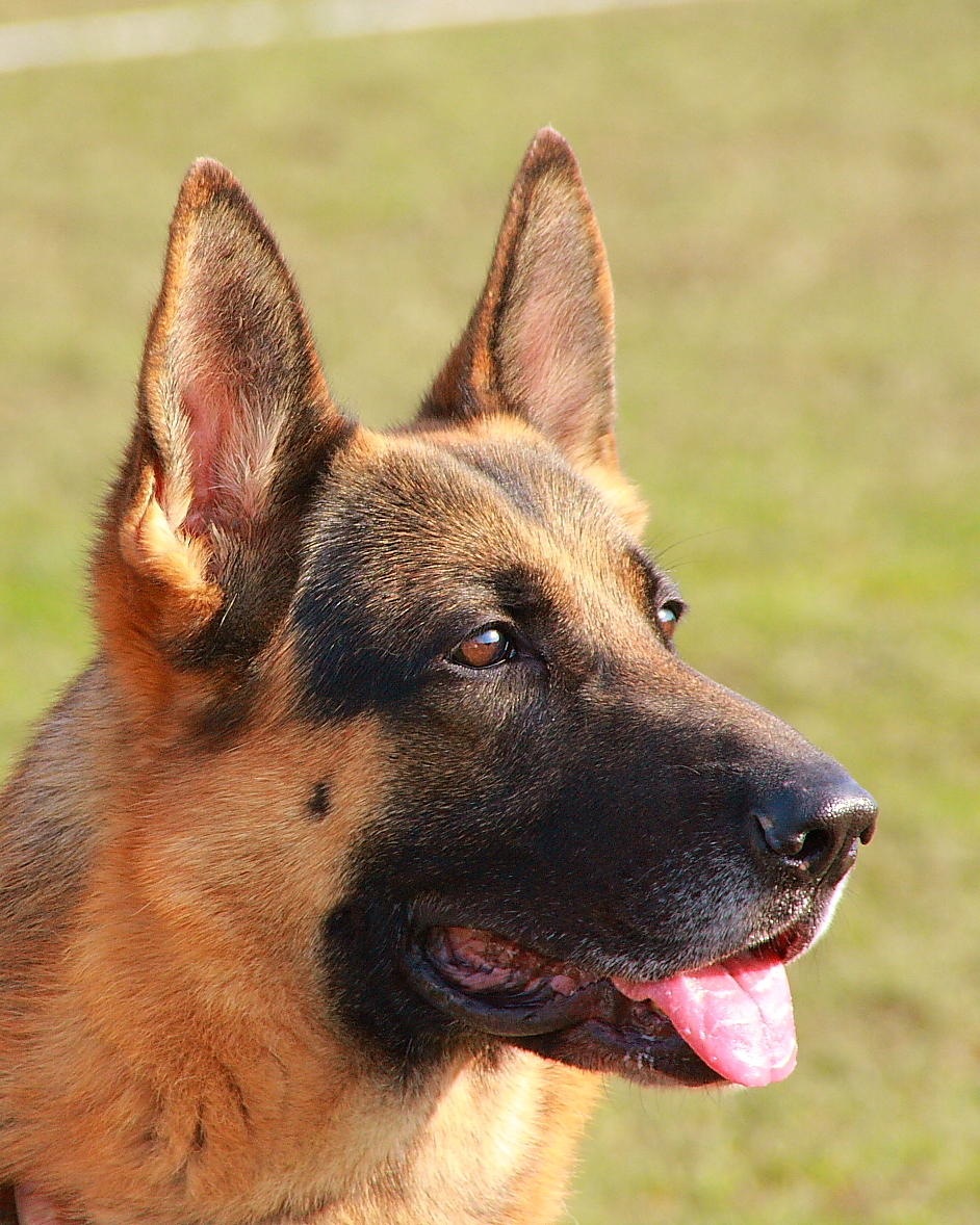 Hlava. Čuchové pole nemeckého ovčiaka má 160 cm2.